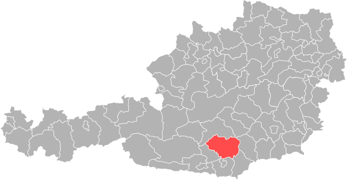 Bezirk Sankt Veit an der Glan in Österreich